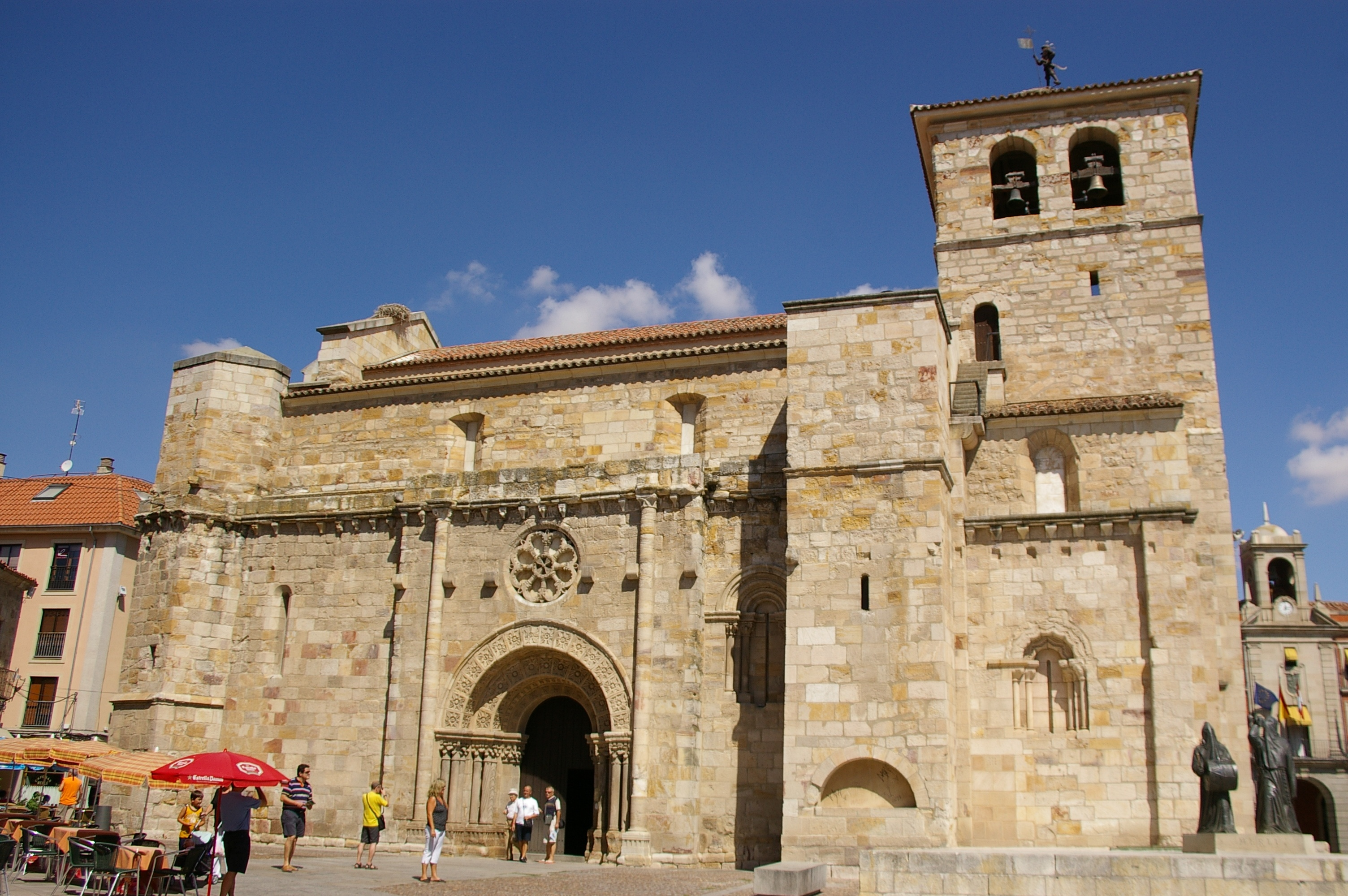 Iglesia de San Juan, en Zamora. (siglos XII-XIII)